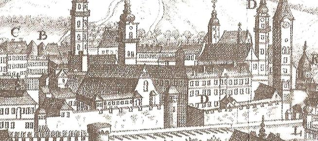 Високий мур у 18 ст.: Західне прясло Високого муру з вежами на панорамі Львова 1772 року.